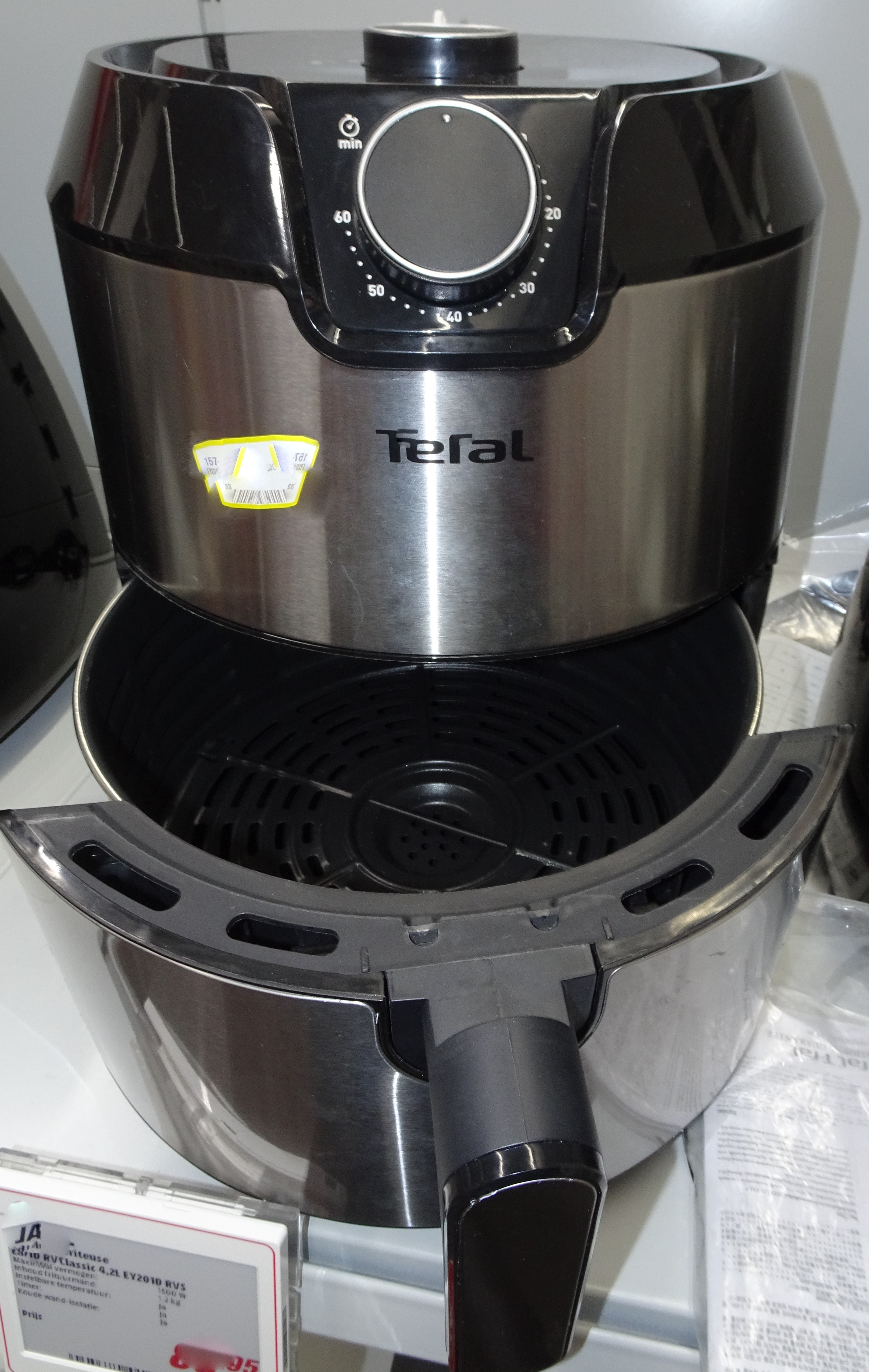 Airfryer in geopende stand met de pan naar buiten geschoven